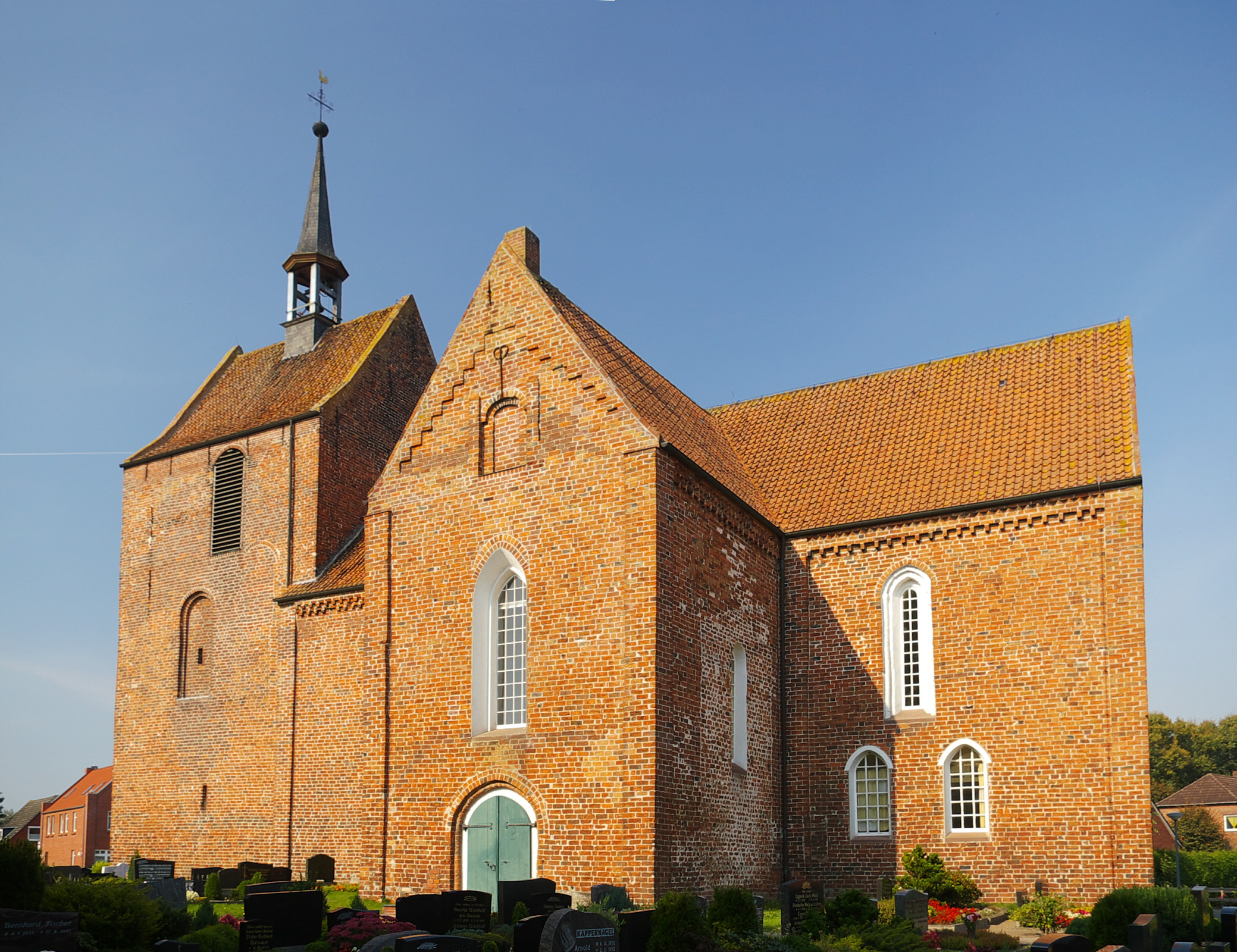 Kirche der ev.-reformierten Gemeinde in Stapelmoor, Emsland